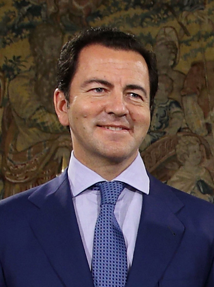 Toledo, 02-07-2013. - La presidenta de Castilla-La Mancha, María Dolores Cospedal, firma un convenio de colaboración con el presidente de la Comunidad de Madrid, Ignacio González, para la renovación de la utilización de los títulos de Abono Transportes para los desplazamientos entre ambas comunidades